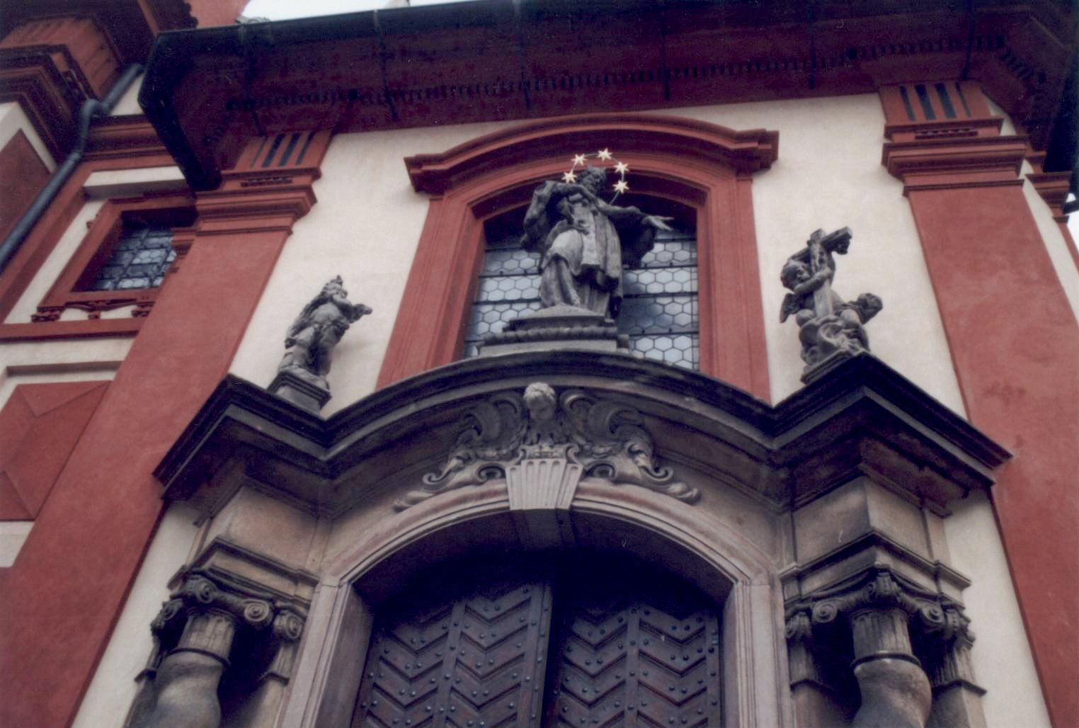 Sousoší svatého Jana Nepomuckého na Pražském hradě u kostela svatého Jiří (1721–22)